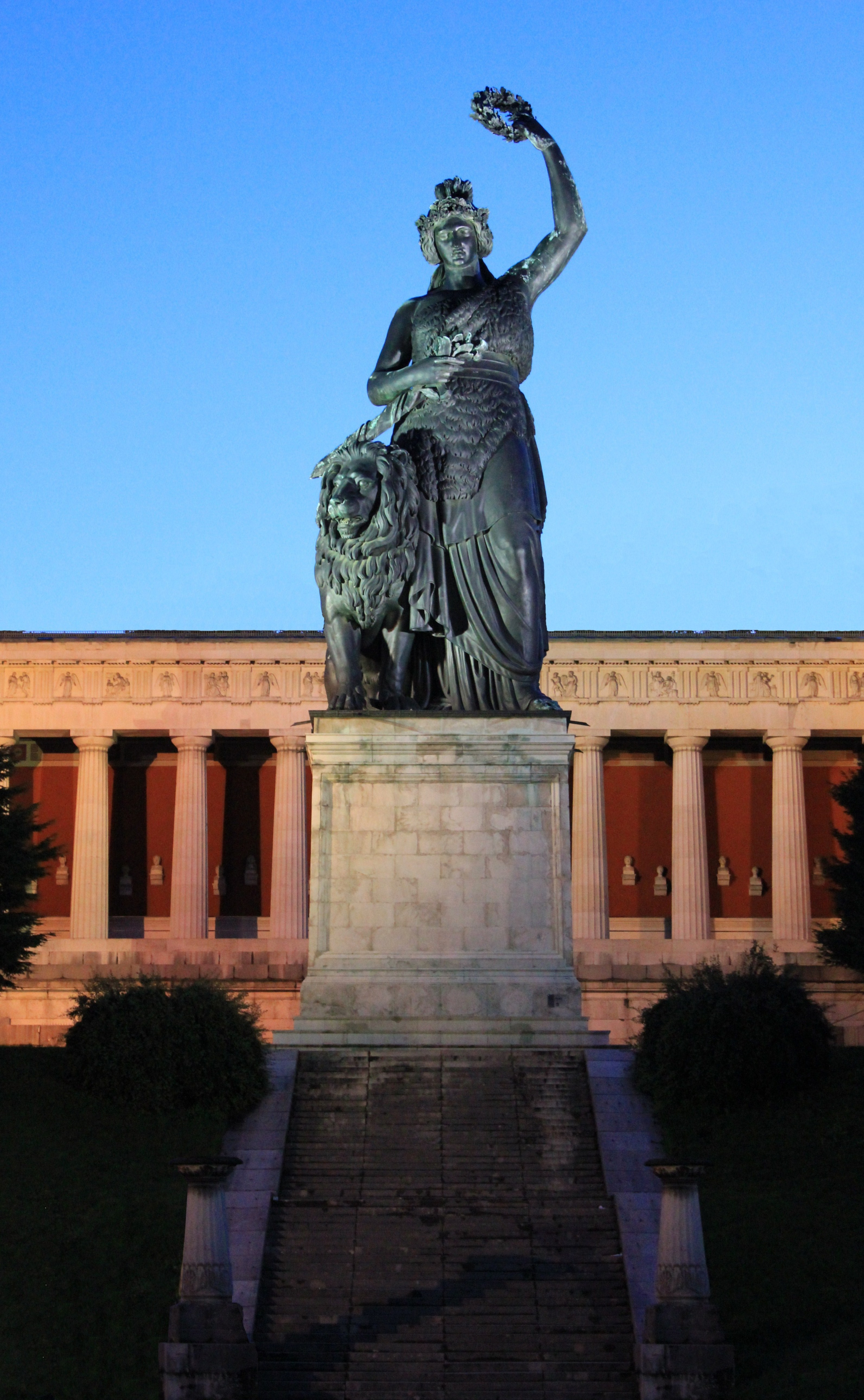 Die Bavaria (der latinisierte Ausdruck für Bayern) ist die weibliche Symbolgestalt und weltliche Patronin Bayerns und tritt als personifizierte Allegorie für das Staatsgebilde Bayern auf. Sie ist eine Bronzekolossalstatue und befindet sich auf der Theresienhöhe. Sie wurde zwischen 1844 und 1850 basierend auf einem Entwurf von Leo von Klenze gebaut, von Ludwig von Schwanthaler modelliert und von Ferdinand von Miller gegossen.